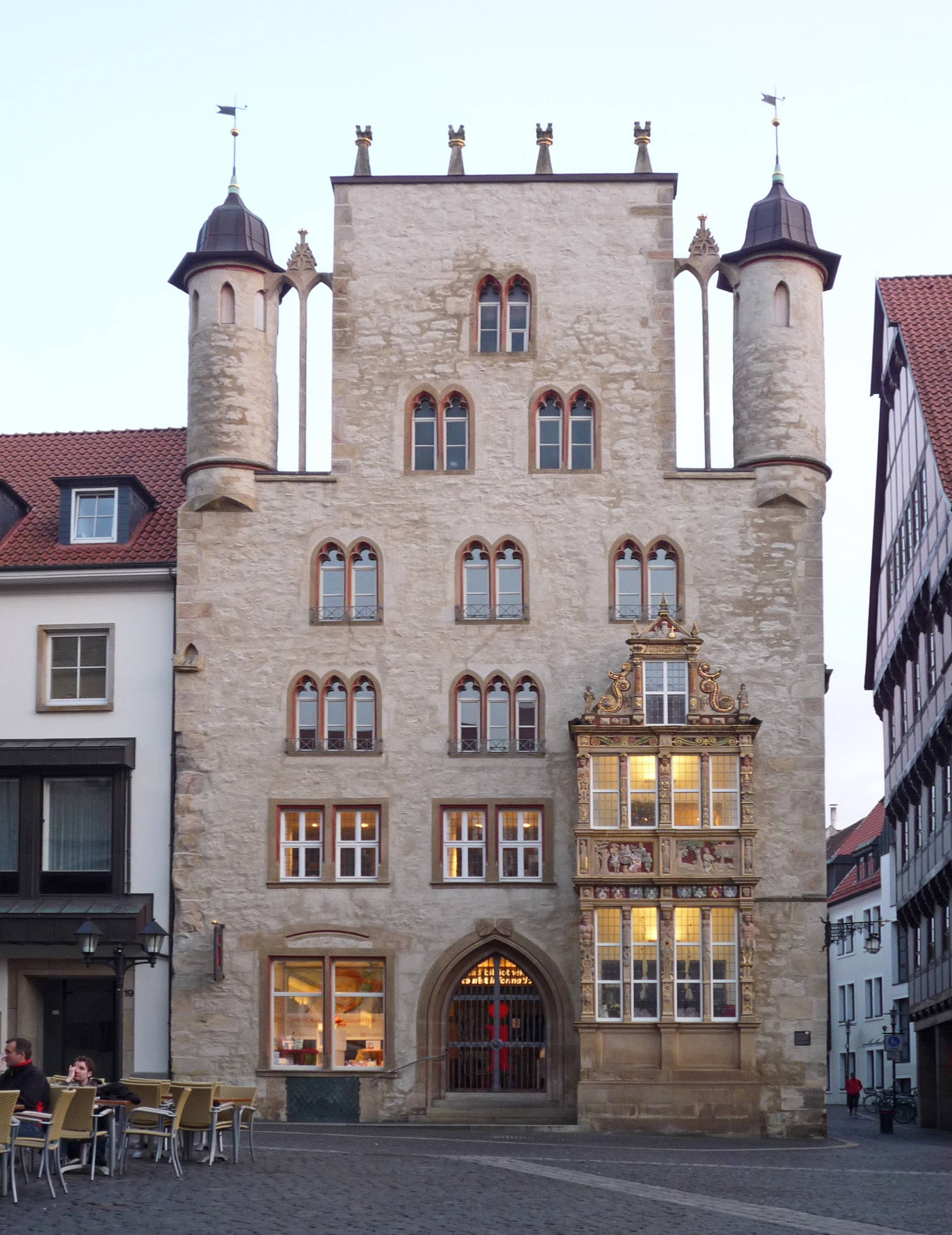 Tempelhaus am Historischen Marktplatz in Hildesheim